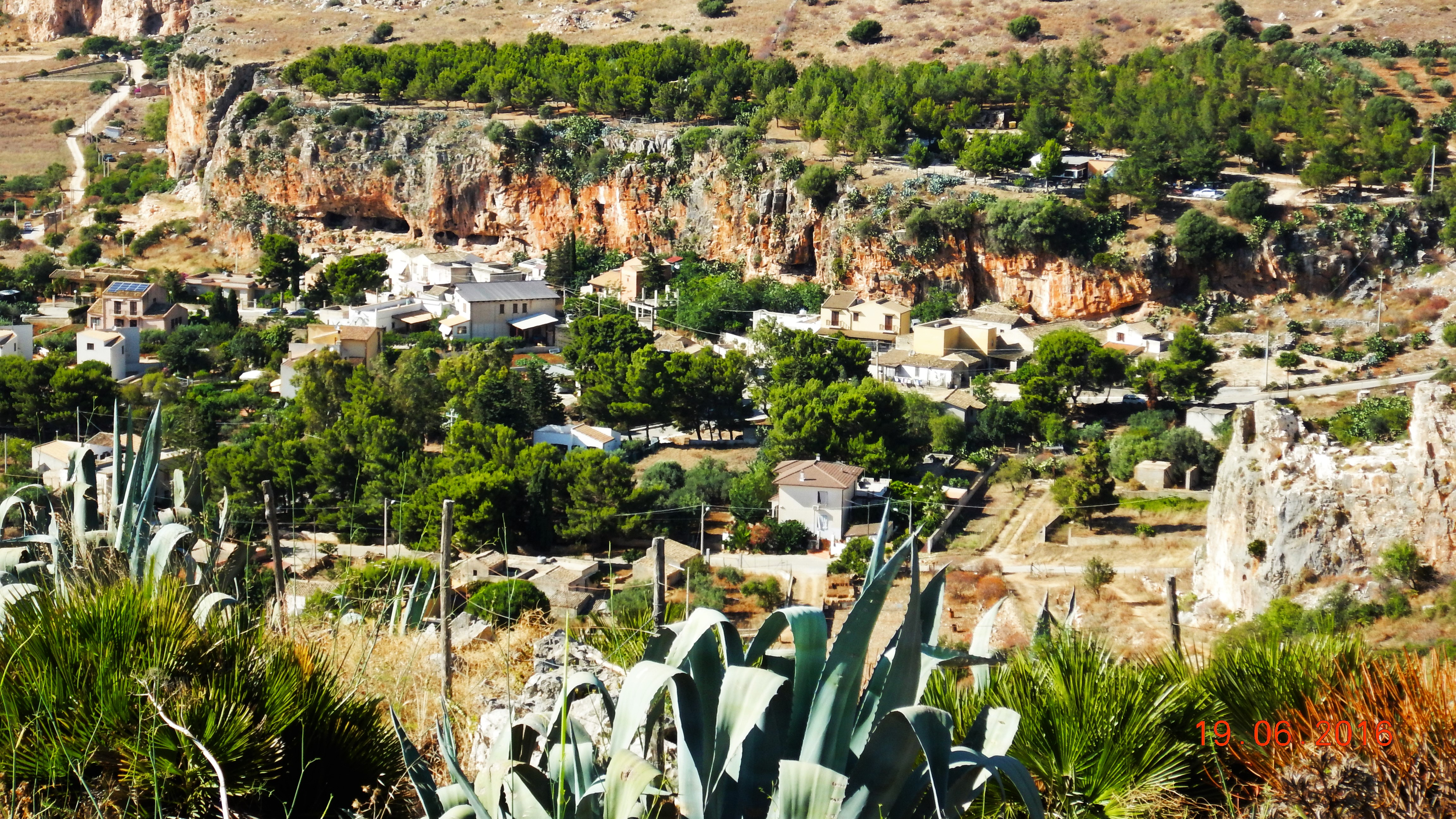 Custonaci - Falesie Parco Cerriolo